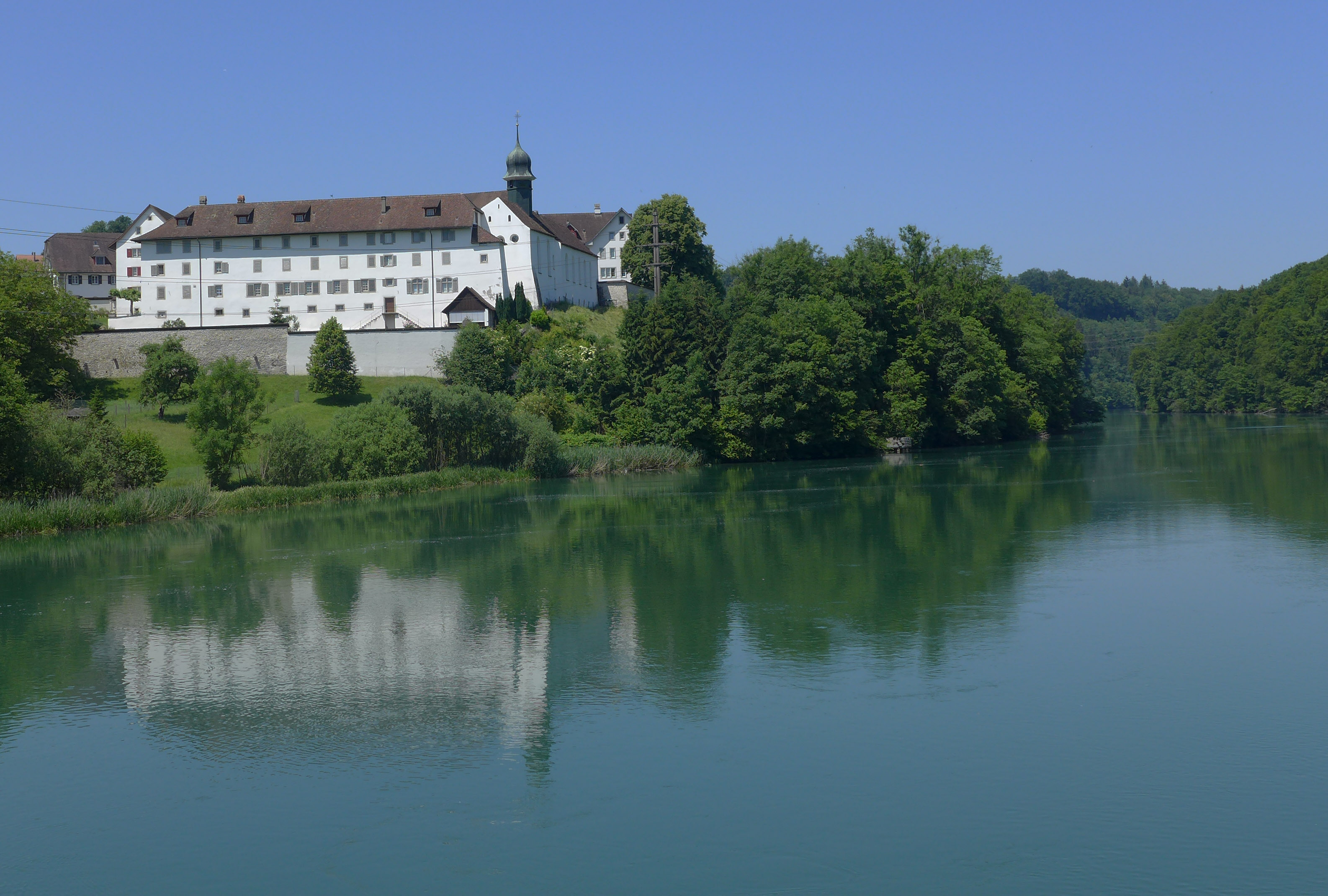 Der Fluss Reuss, am westlichen Ufer das Kloster Hermetschwil